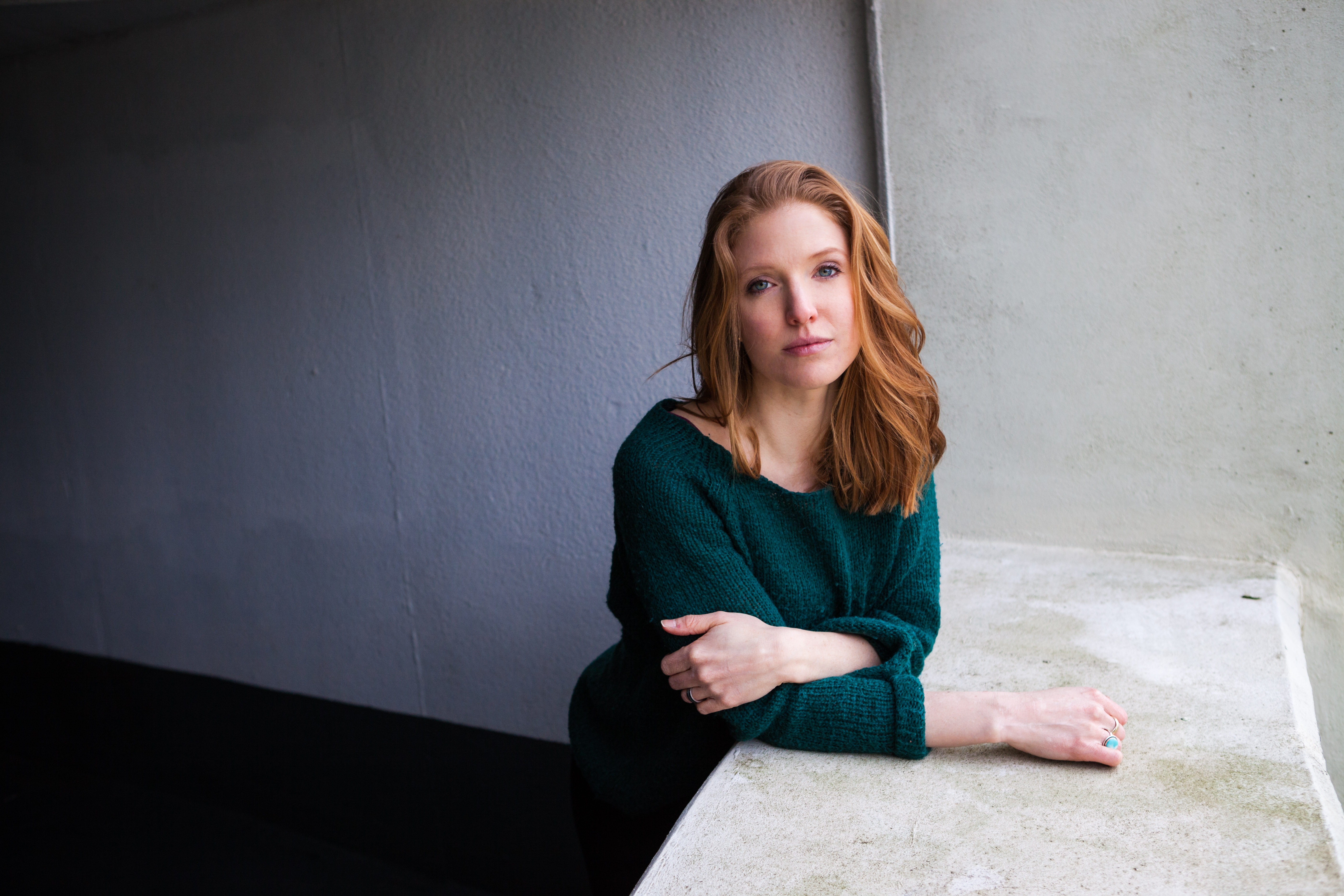 Foto von der Schauspielerin Ebba Ekholm